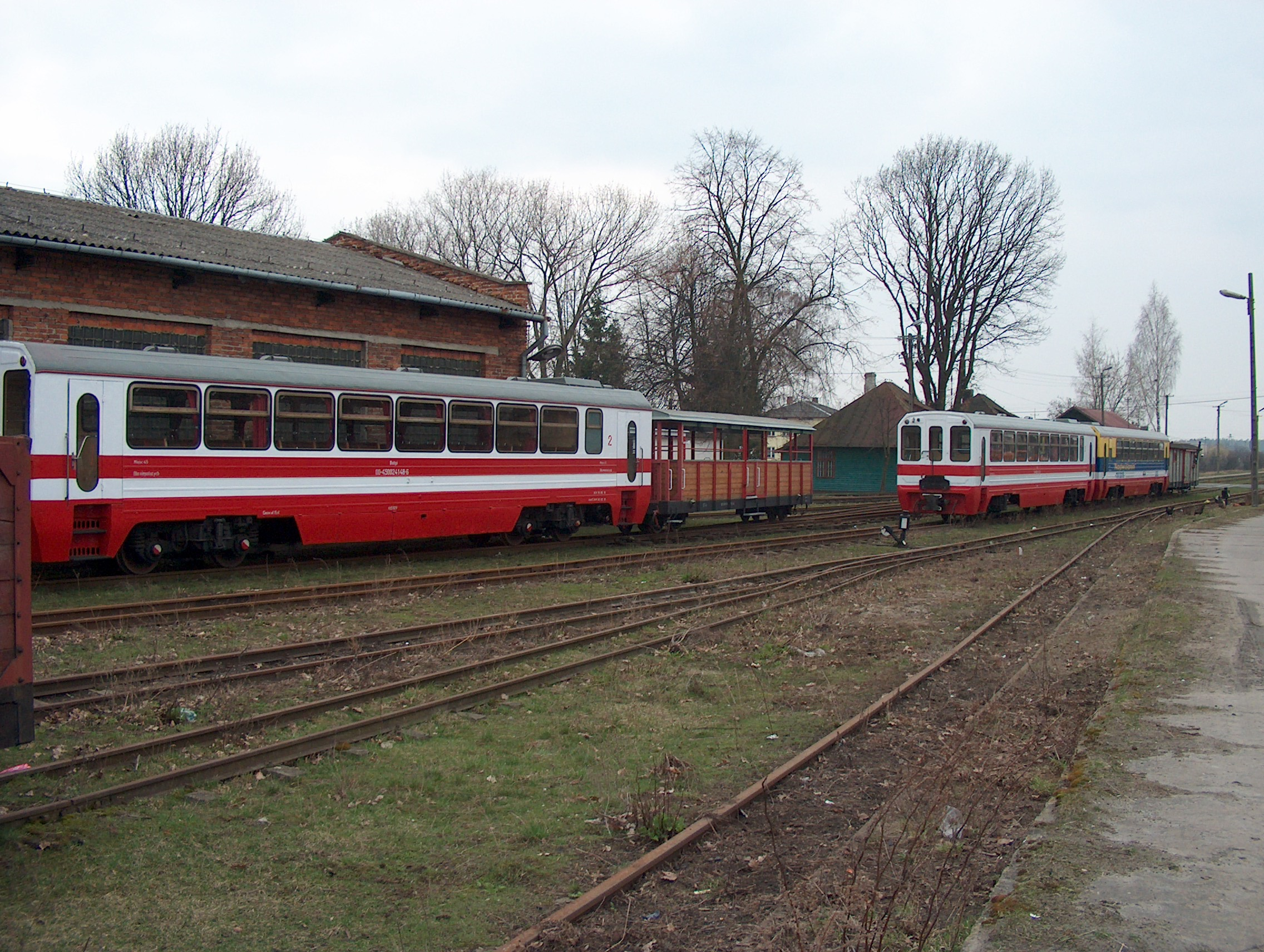 Karczmiska, stacja kolei wąskotorowej Nadwiślanin.